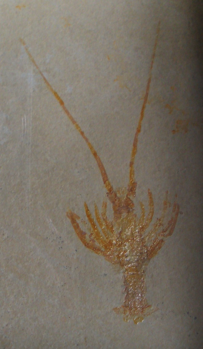 Fossil of Palinurina, an extinct crustacean- Took the photo at Teylers Museum, Haarlem